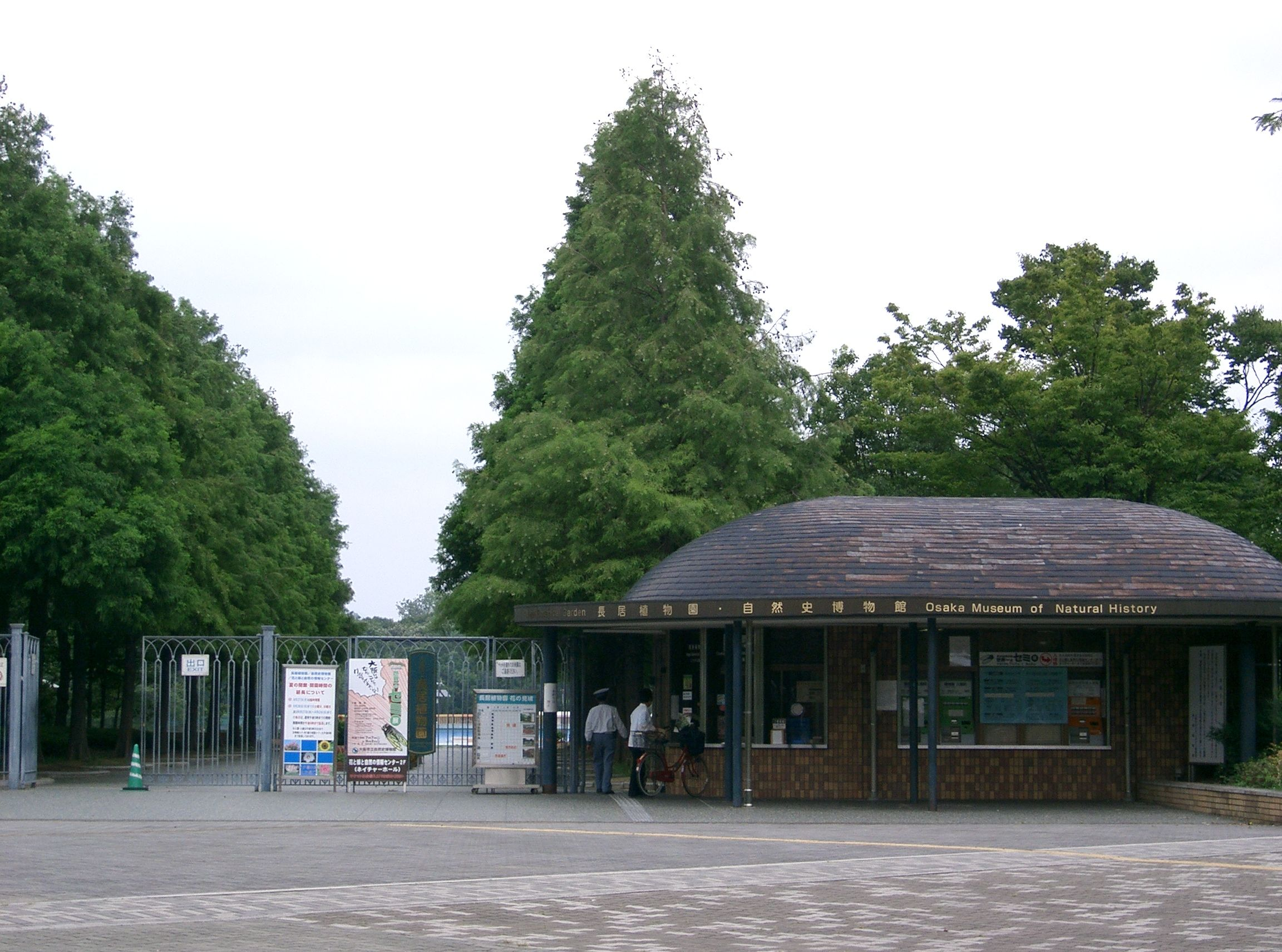 大阪市立長居植物園、大阪市立自然史博物館の入口（植物園内に博物館がある）